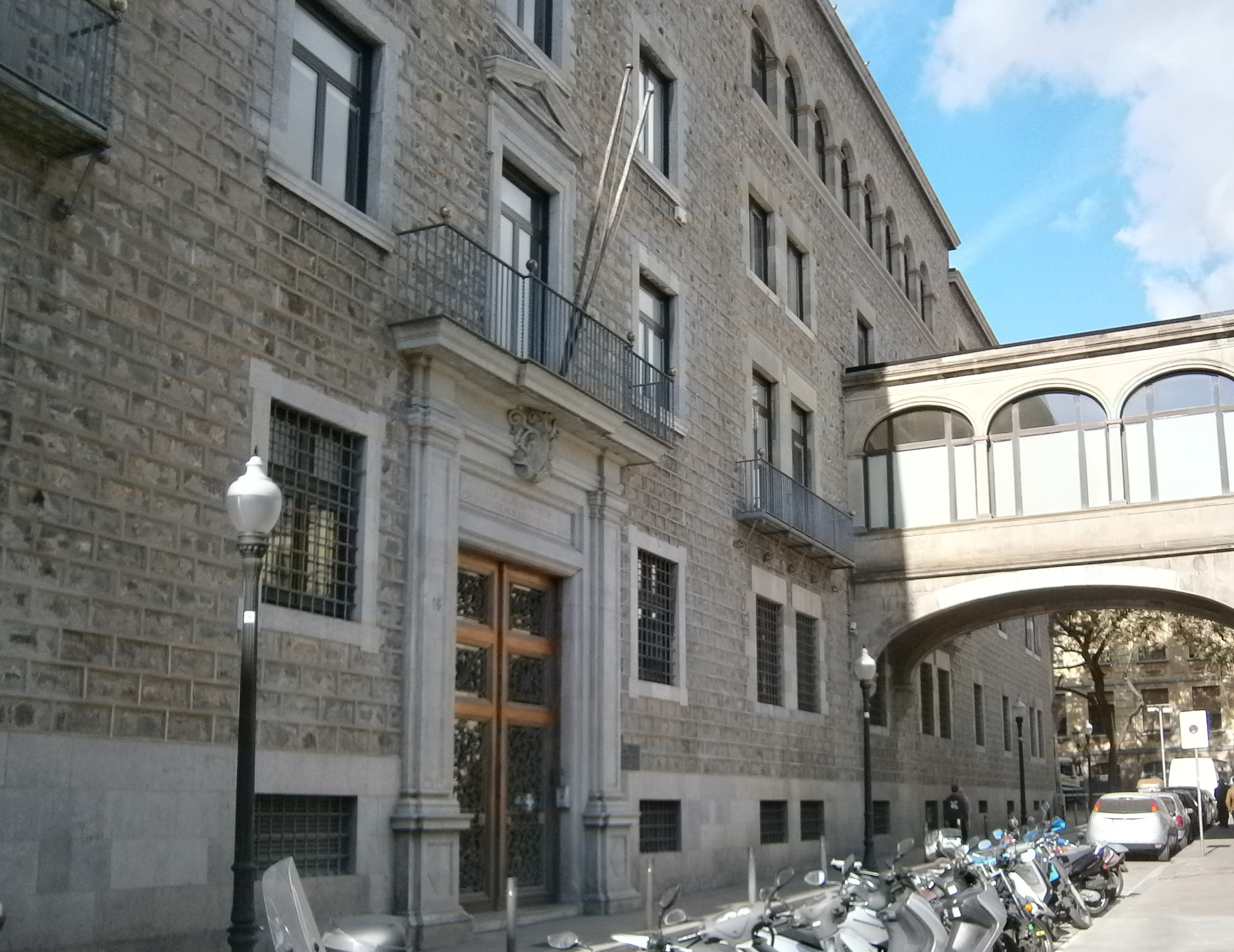 Barcelona, Catalunya: Institució Milà i Fontanals. Façana principal.